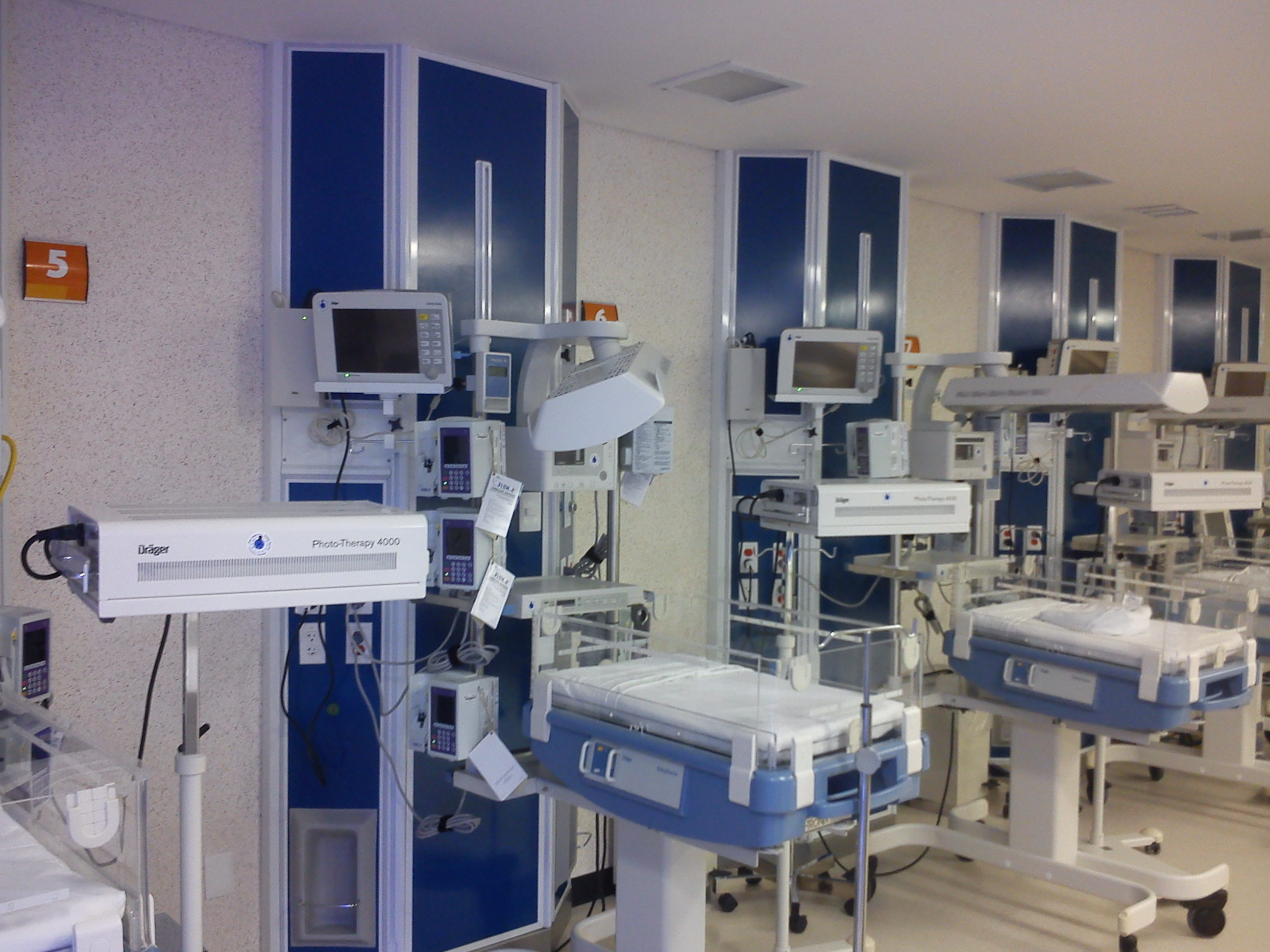 Terapia intensiva neonatal